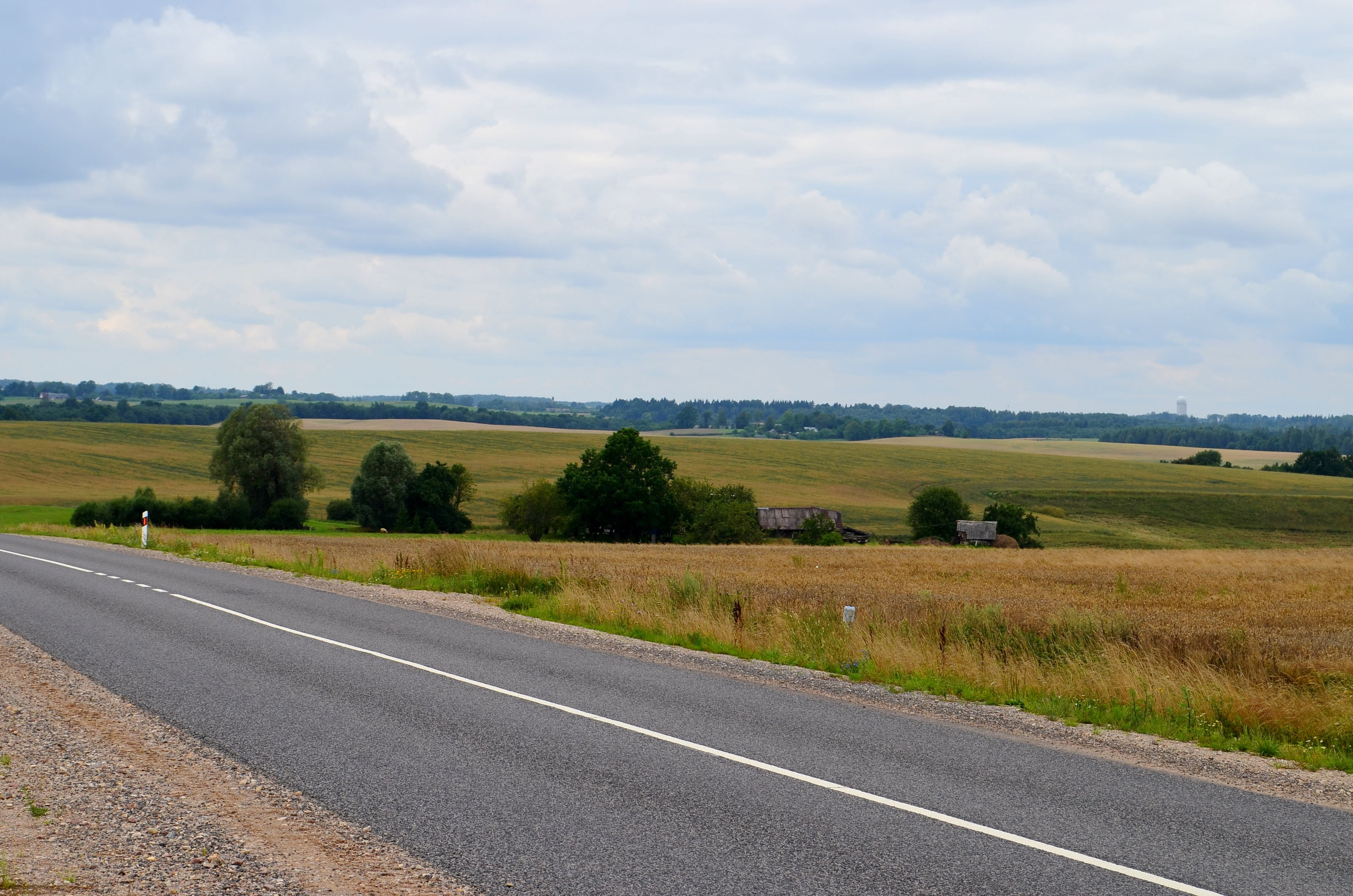 Izabelinės k., N. Daugėliškio sen., Ignalinos raj.